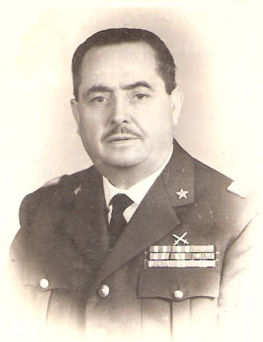 Portrait of Gen Francesco Rizzi